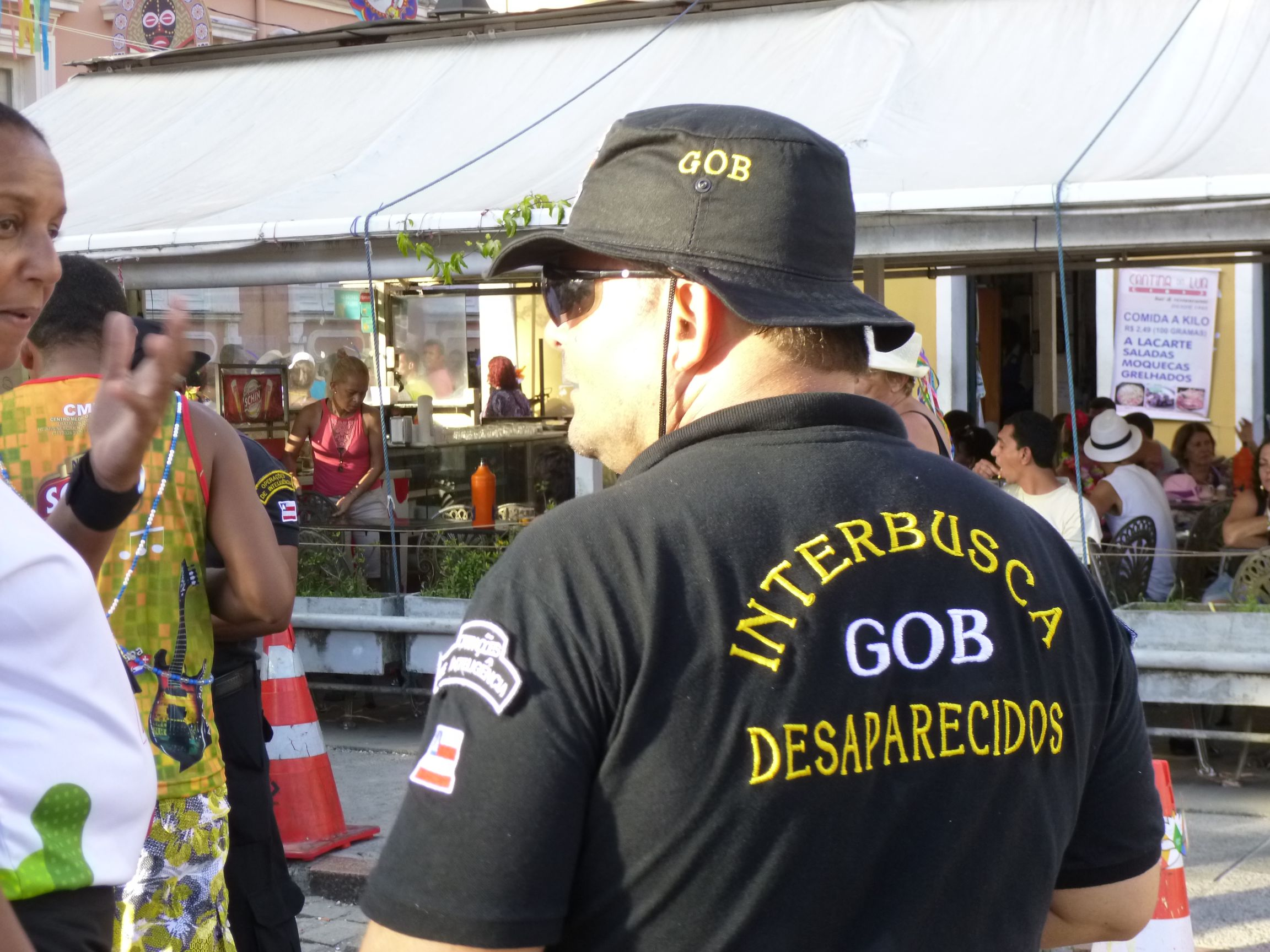 Such-Trupps nach verlorenen Kindern